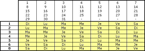 Calendrier perpétuel Moret. Tableau 3 : jours.